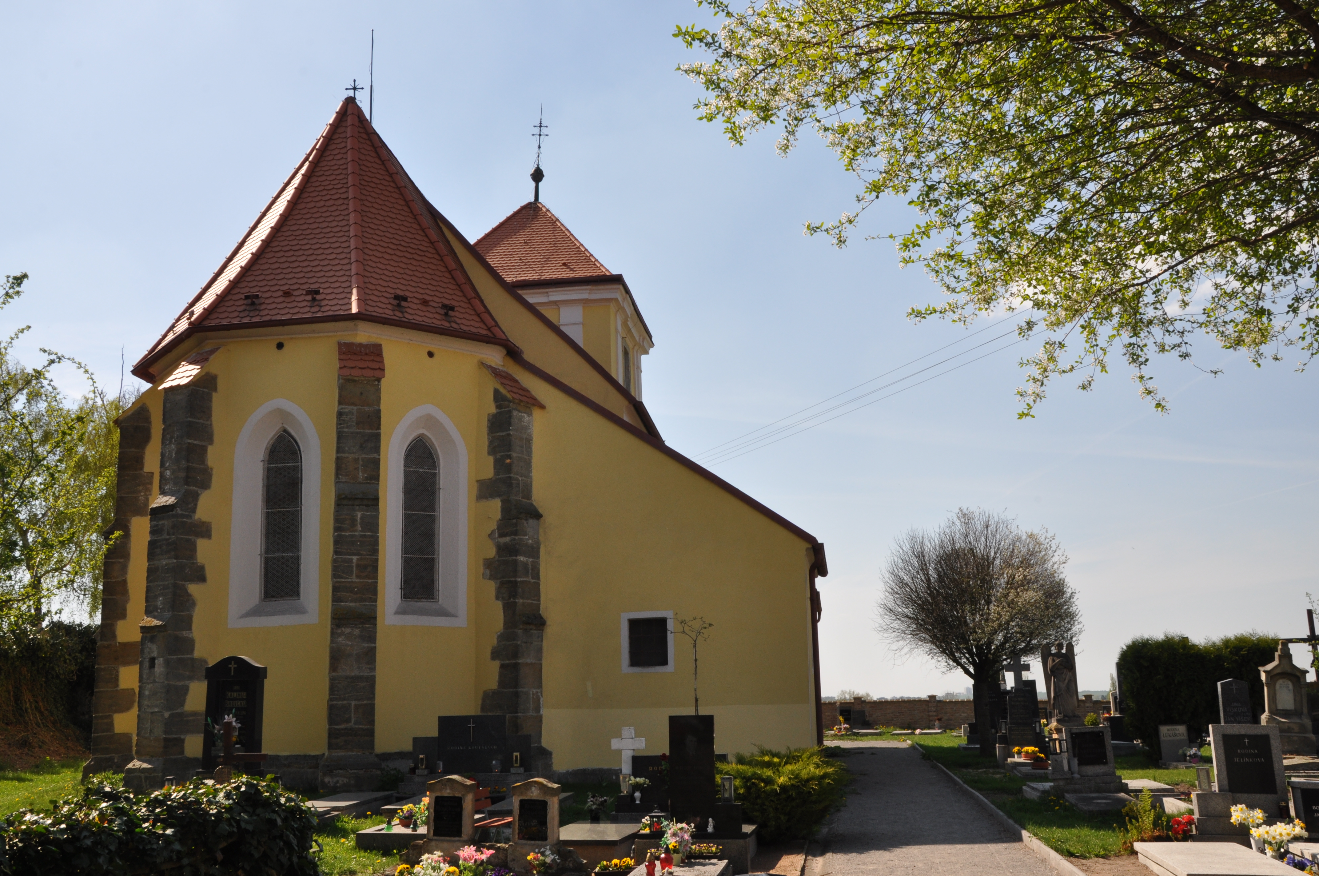 Kostel Povýšení svatého Kříže v Honbicích, okres Chrudim